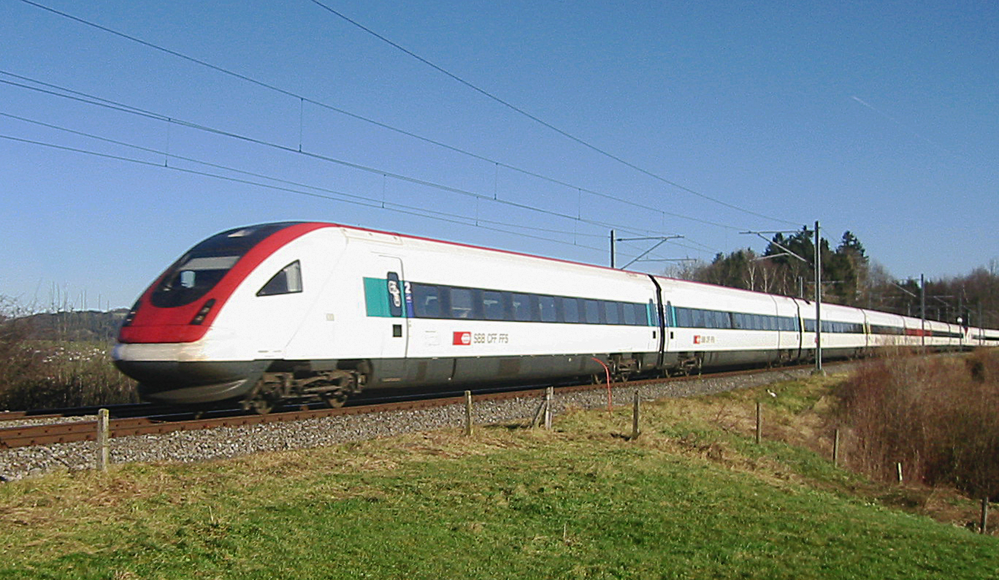 SBB RABDe 500 (InterCity Neigezug) of the Swiss Federal Railways SBB CFF FFS between Schwarzenbach SG and Algetshausen-Henau, 2004-12-25, Photographed by User:Filzstift SBB RABDe 500 (InterCity Neigezug) der Schweizerischen Bundesbahnen SBB zwischen Schwarzenbach SG und Algetshausen-Henau am 25.12.2004. Fotografiert von User:Filzstift SBB RABDe 500 (InterCity Neigezug) de los Ferrocarriles Federales Suizos SBB CFF FFS entre Schwarzenbach SG y Algetshausen-Henau, 2004-12-25, Fotografía por User:Filzstift